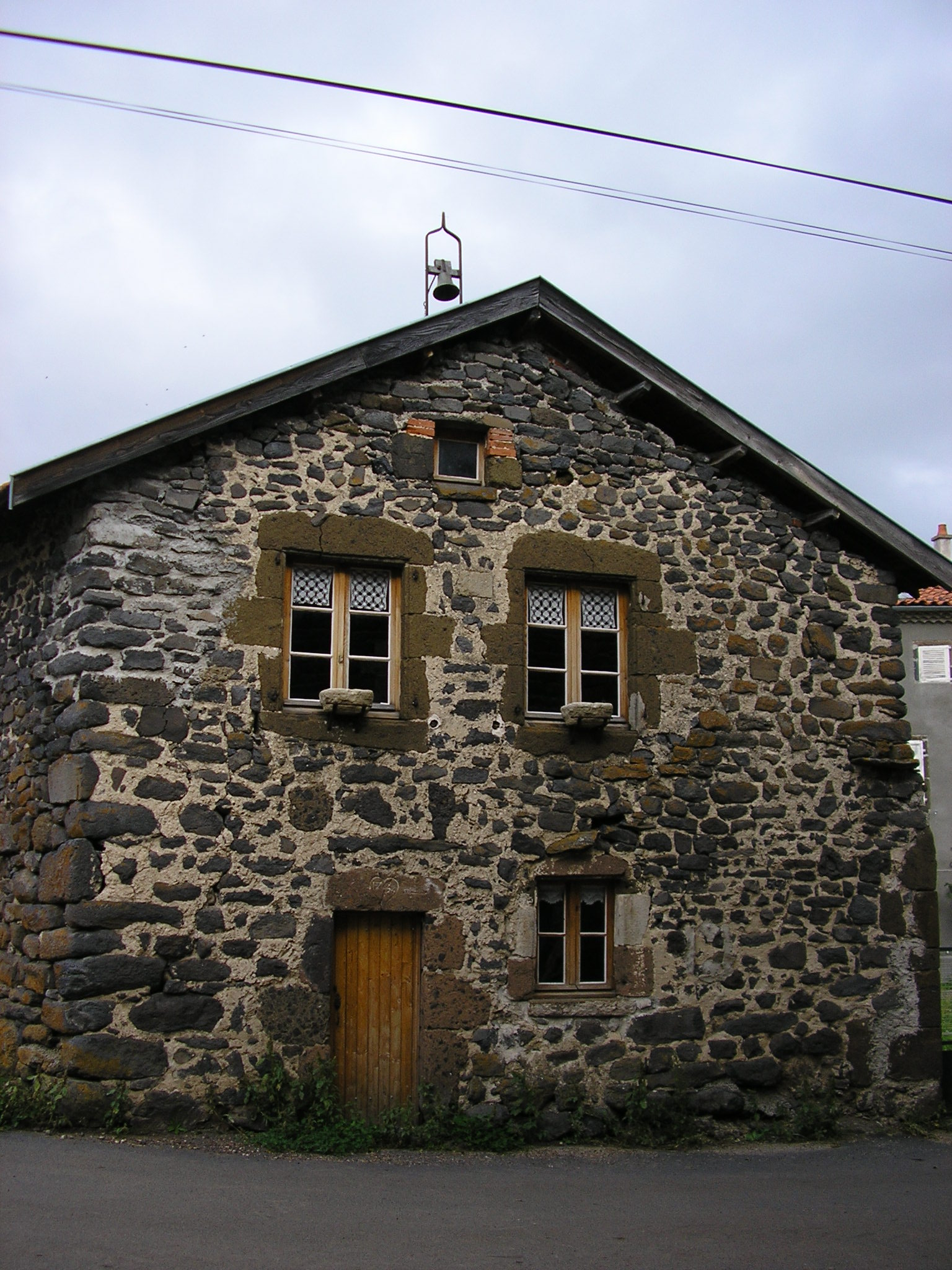 Maison de la béate de Civeyrac Photographie personnelle de l'utilisateur Clodion.